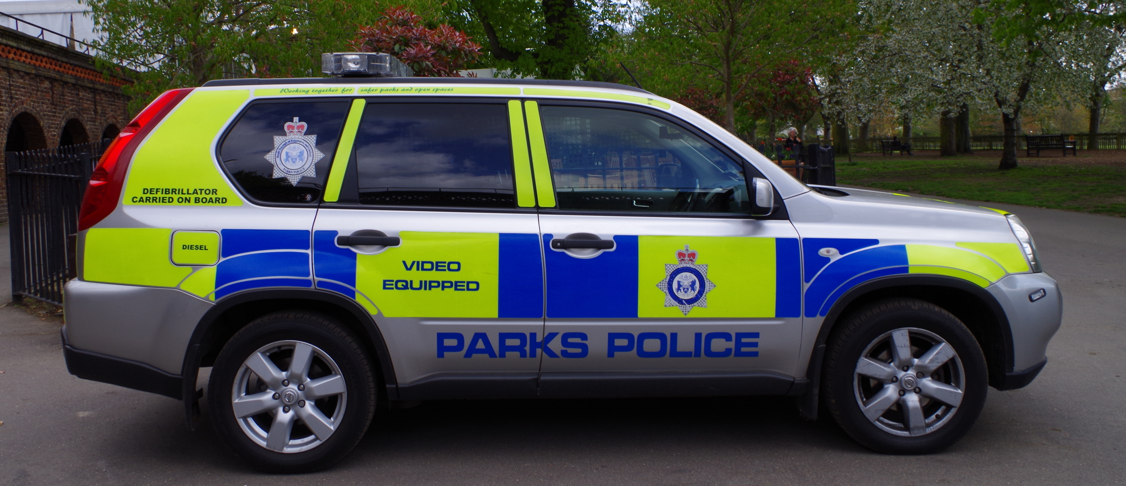 Parks Police X-Trail - with video and defibrillator - London Holland Park